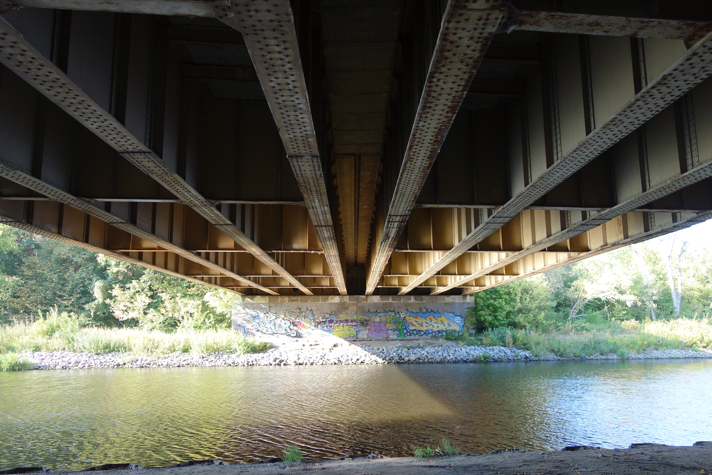 Autobahnbrücke Dreilinden, Blick nach Norden, an der ehem. Grenzlinie wechselt die Technologie der Fahrbahnplatte